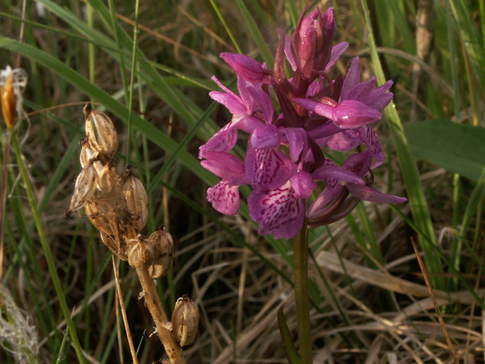 Dactylorhiza traunsteineri subsp. russowii, Zwischenmoor, Litauen